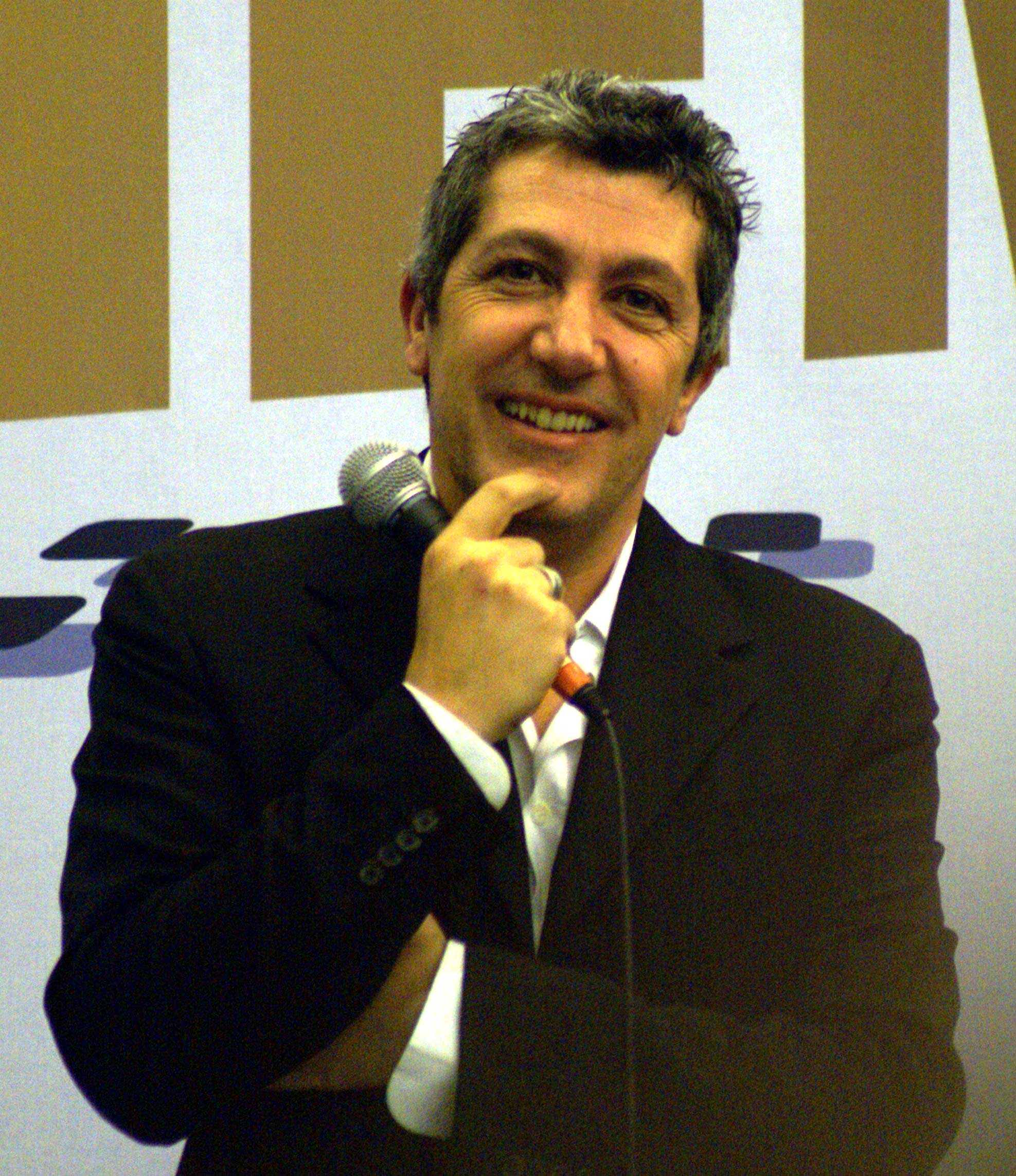 Alain Chabat lors du "Salon du Cinéma" le 14/01/2006 - Photo de Pascal Fernandez